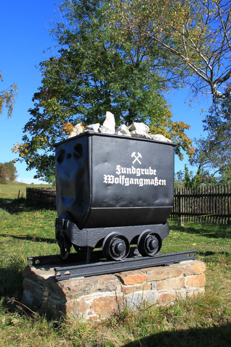 Fundgrube Wolfgangmaßen in Neustädtel